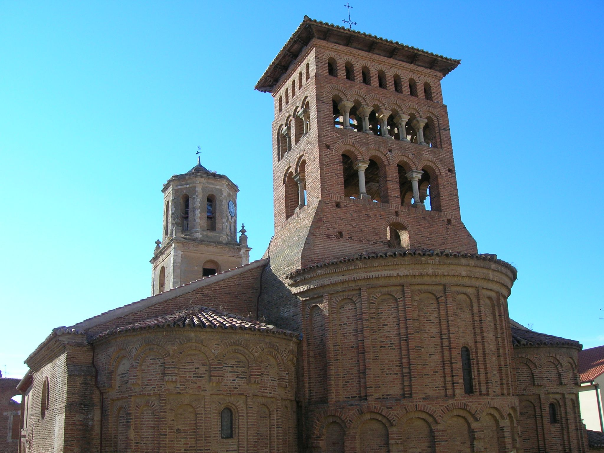 Iglesia románica de estilo mudéjar construida en el siglo XII.